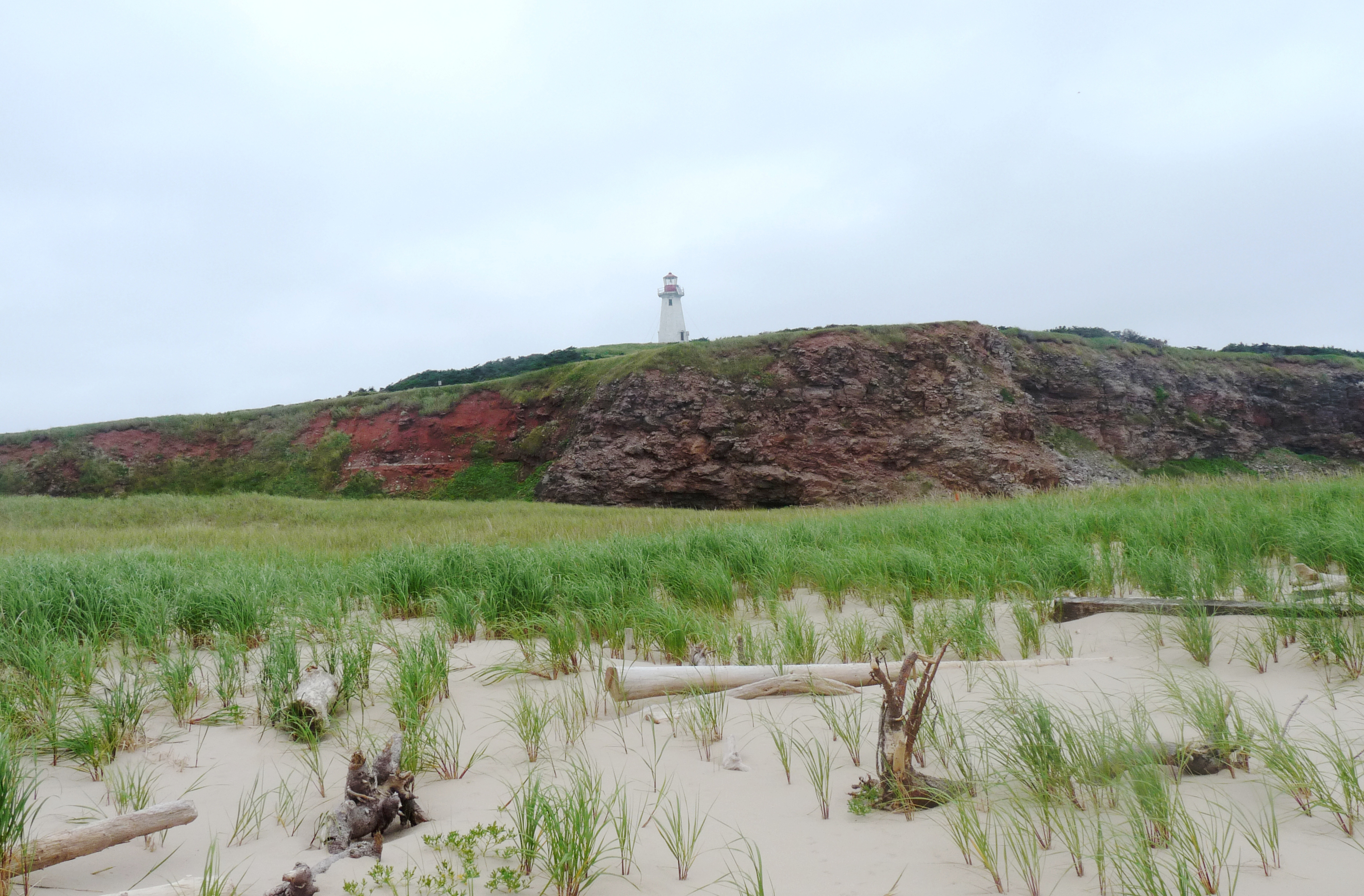 Plage des visiteurs de l'ile Brion et phare en arrière plan